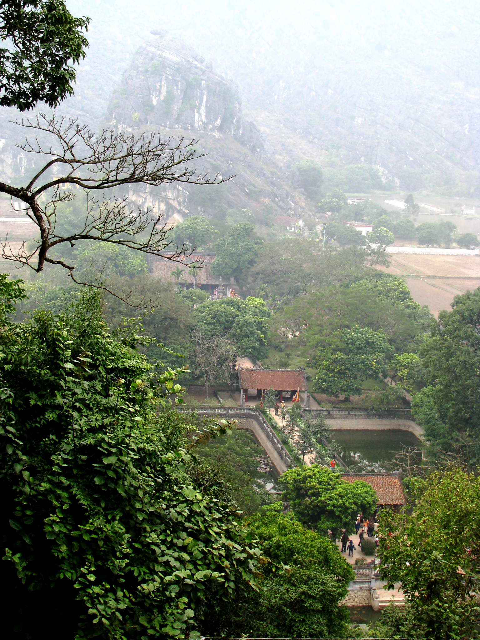 Đền thờ Đinh Tiên Hoàng ở Hoa Lư nhìn từ trên cao xuống.